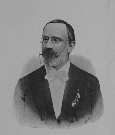 Česky: průmyslník Bohumil Bondy